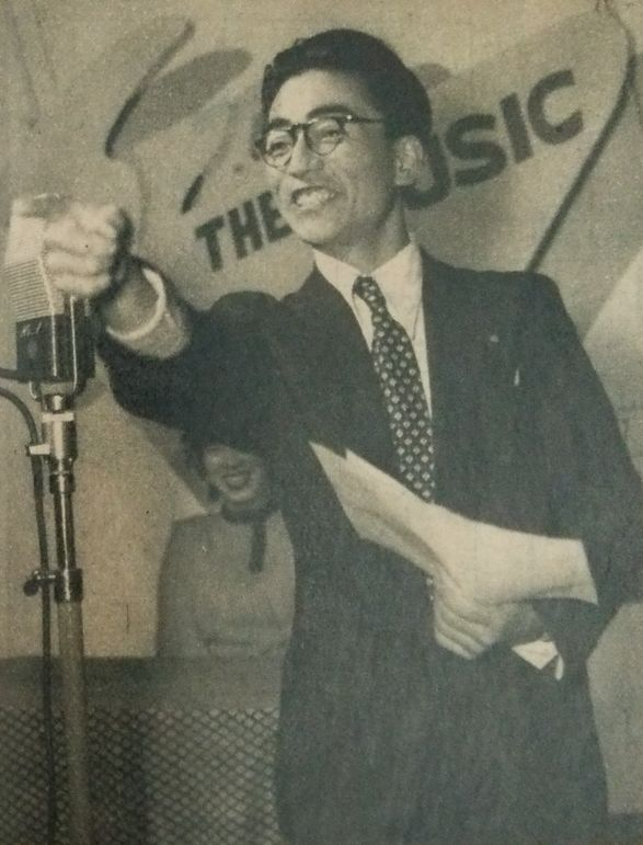 中部日本放送CBCラジオアナウンサー栗谷俊男、中部日本放送放送劇団（劇団CBC）第1期生。